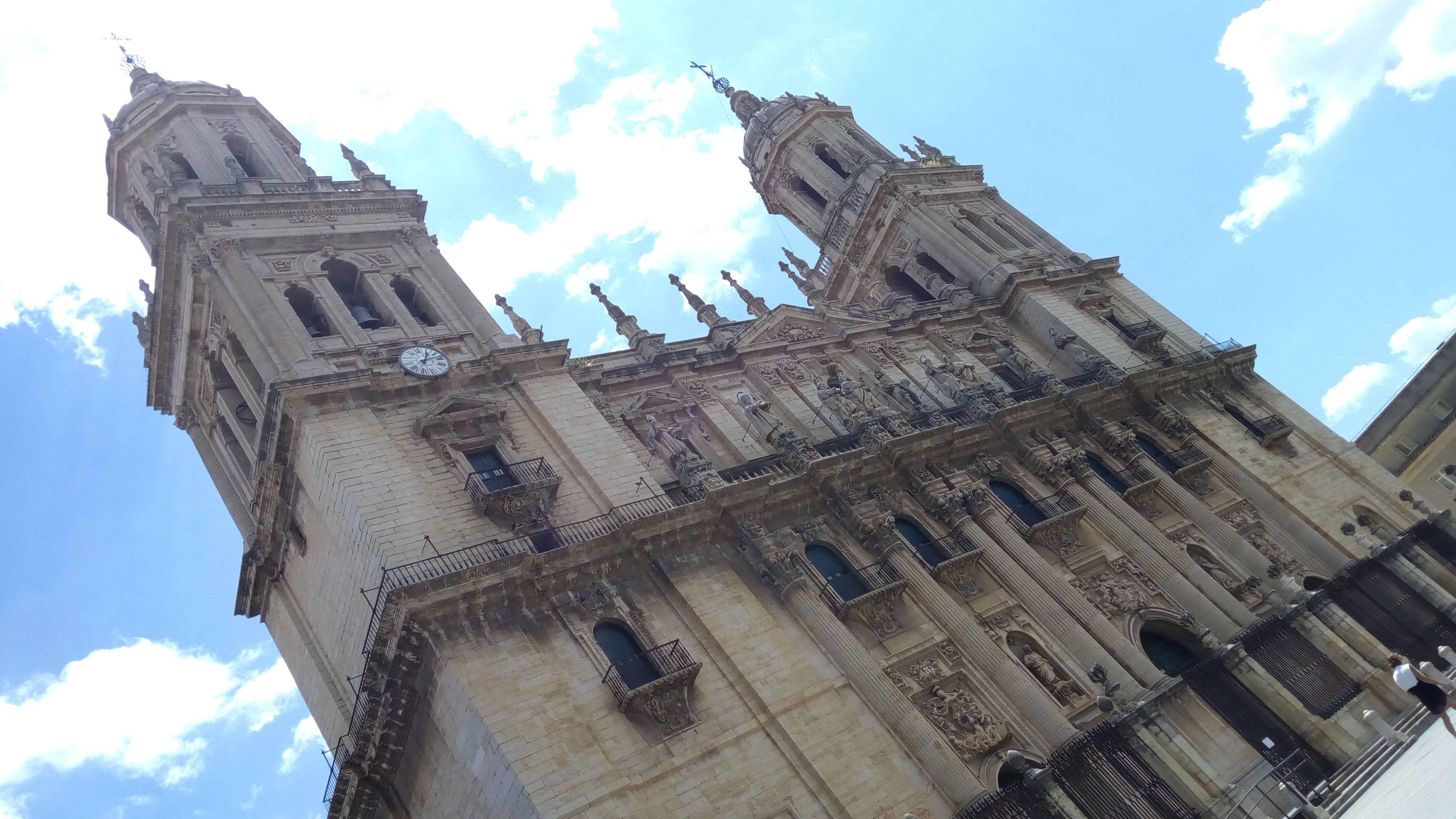 Катедрала град Хаен, Андалусия, Испания